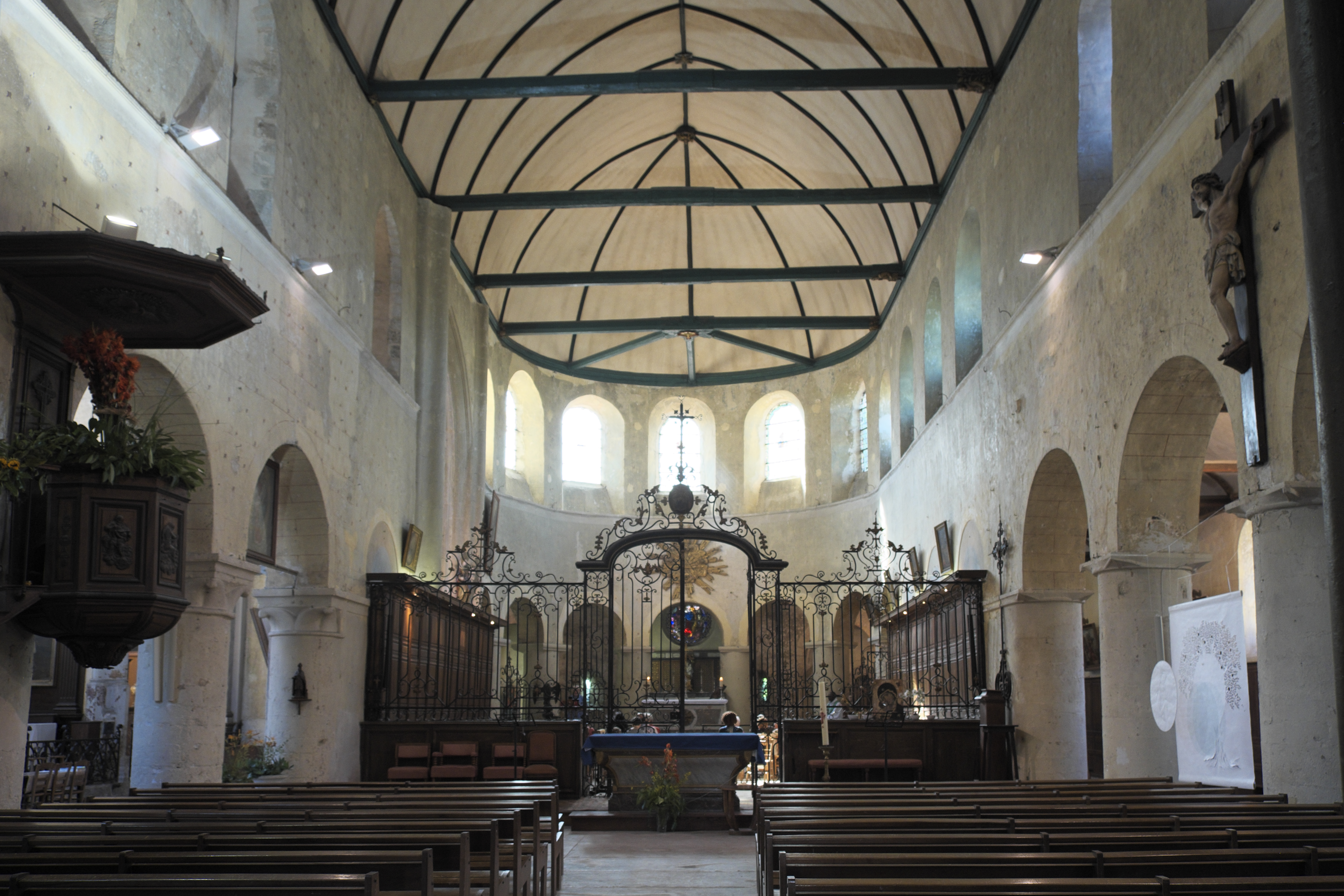 Katholische Kirche Sainte-Croix in Bray-sur-Seine im Département Seine-et-Marne (Region Île-de-France/Frankreich), Innenraum